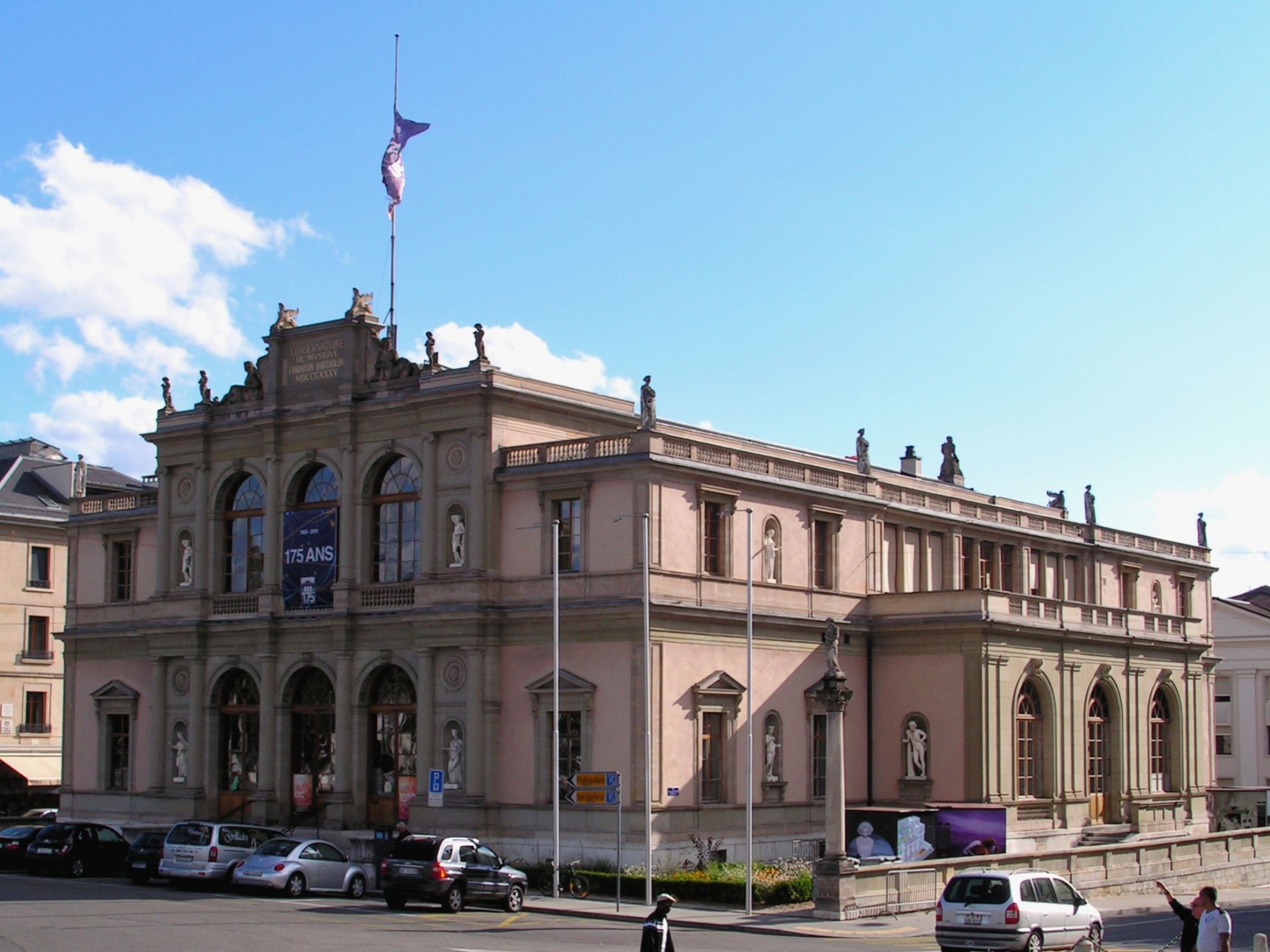 Place de Neuve 4, Genève. Le conservatoire de musique. Vue depuis la place de Neuve.